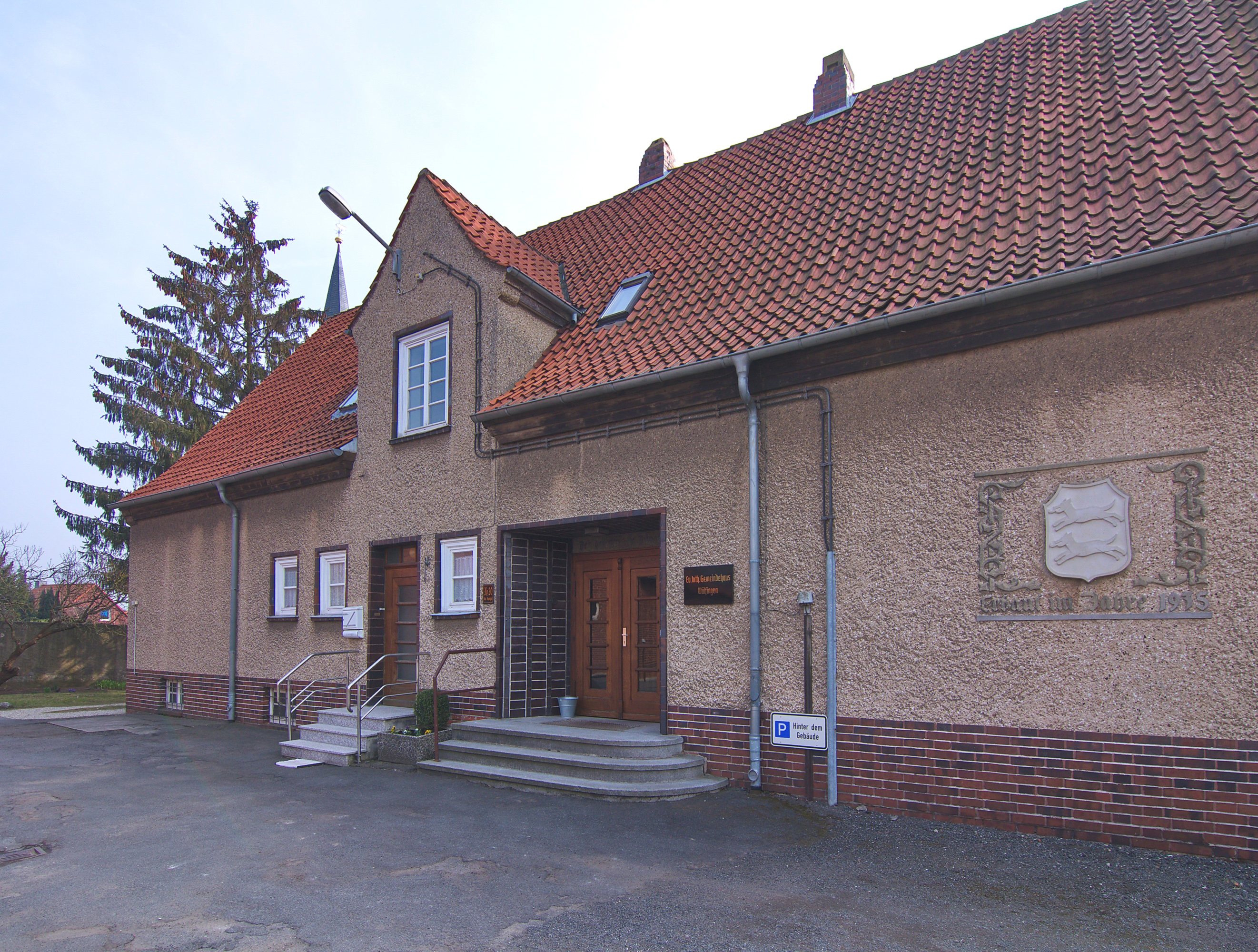 Ev. Gemeindehaus in Wülfingen (Elze), Niedersachsen, Deutschland.